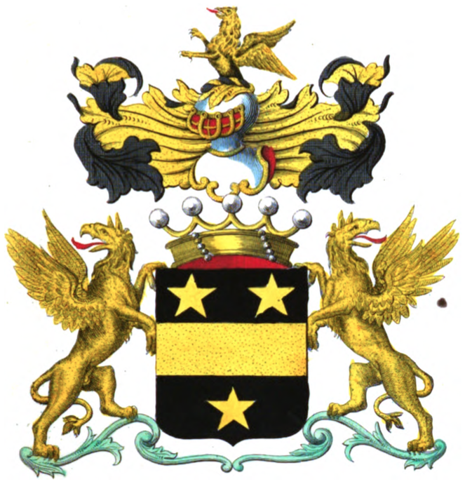 Armoiries de la famille Bounder